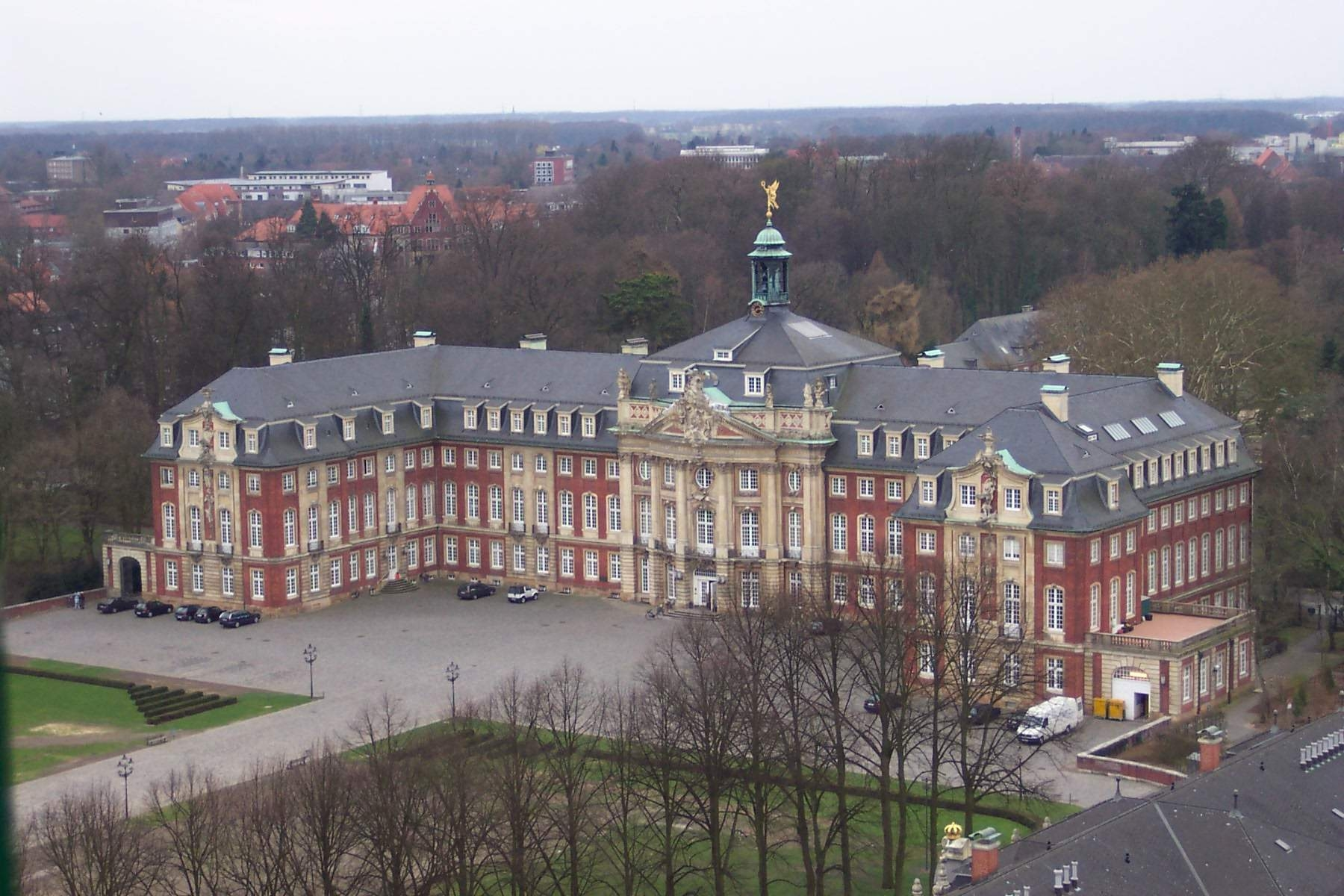 Das münsteraner Schloss fotografiert aus einem Riesenrad auf dem Hindenburgplatz